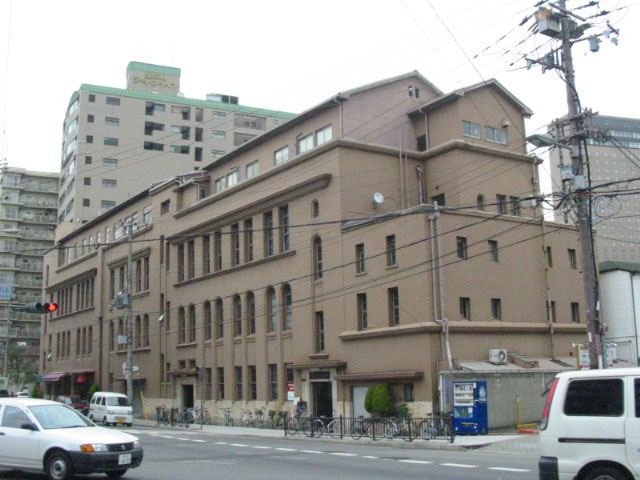 莫大小会館（現 メリヤス会館、大阪市福島区、1929年、設計:宗建築事務所）